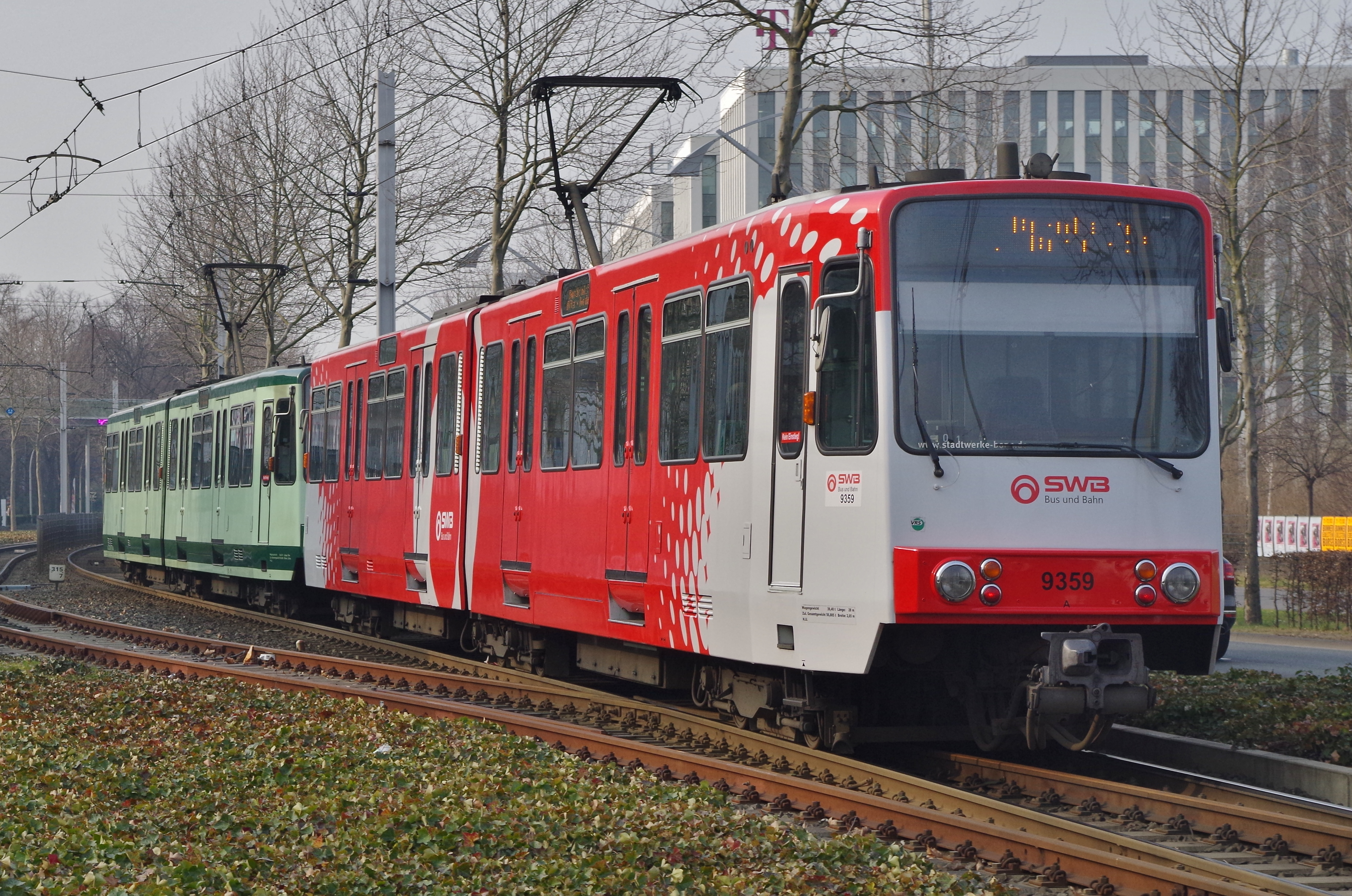 Ein B-Wagen der 5. Serie in Unternehmensfarbe